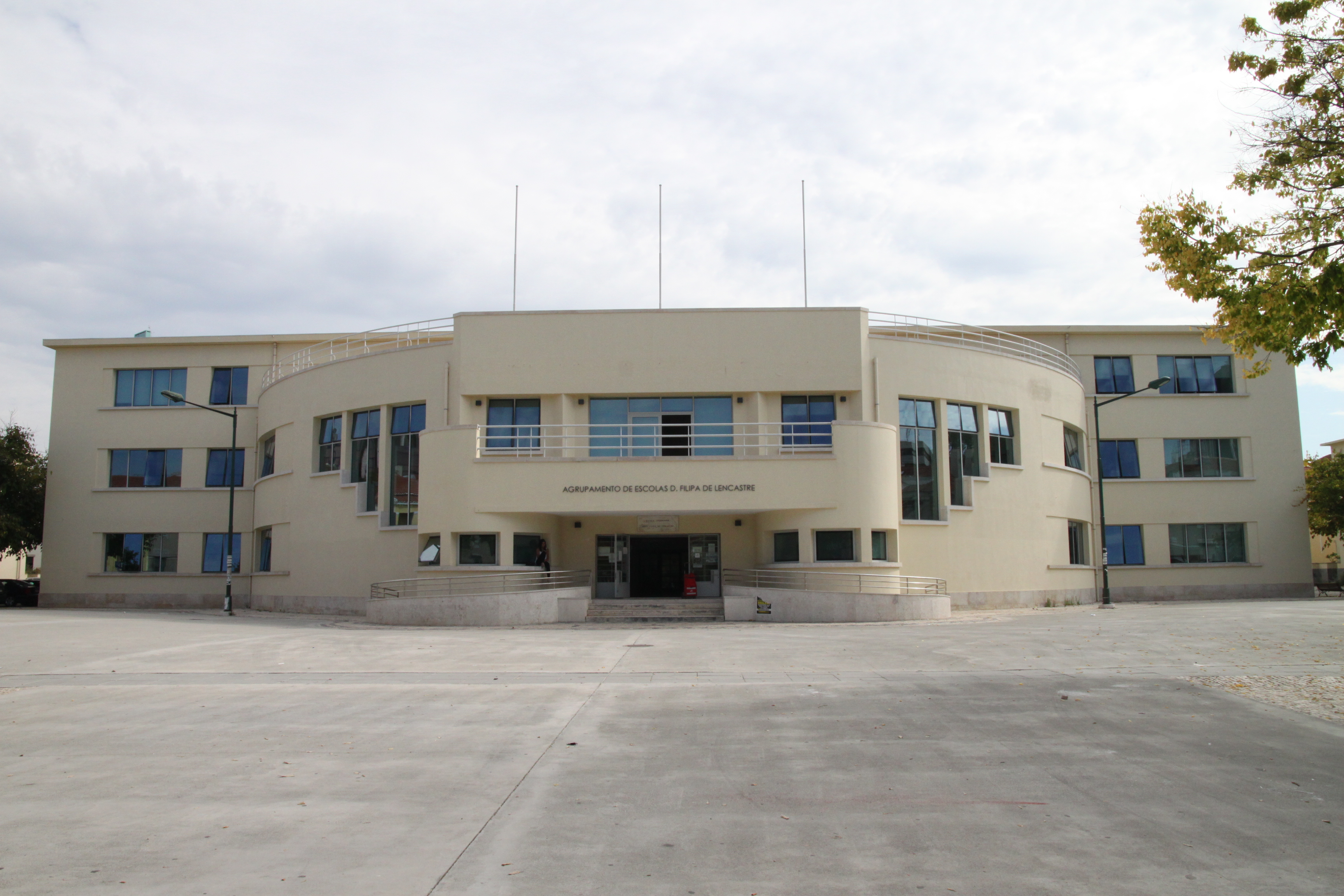 Liceu Dona Filipa de Lencastre This file was uploaded for Wiki Loves Monuments in Portugal with the unique identifier 97007785.